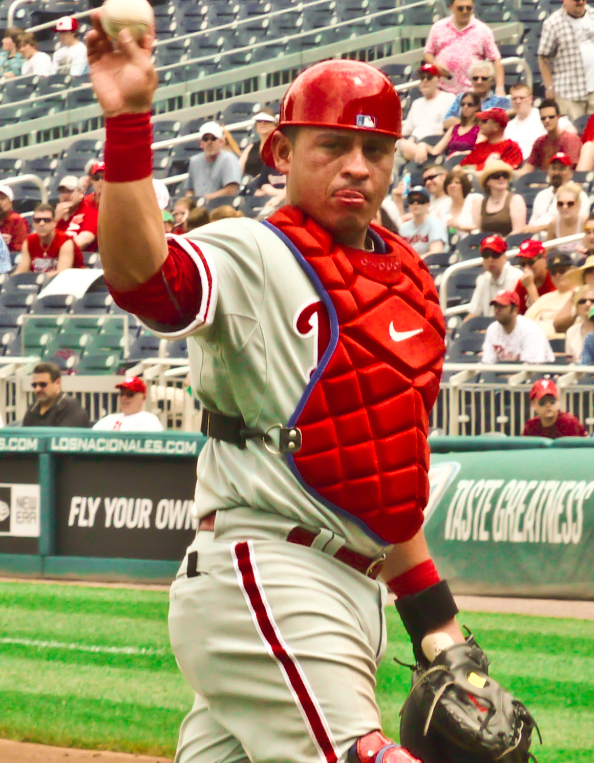 Carlos Ruiz